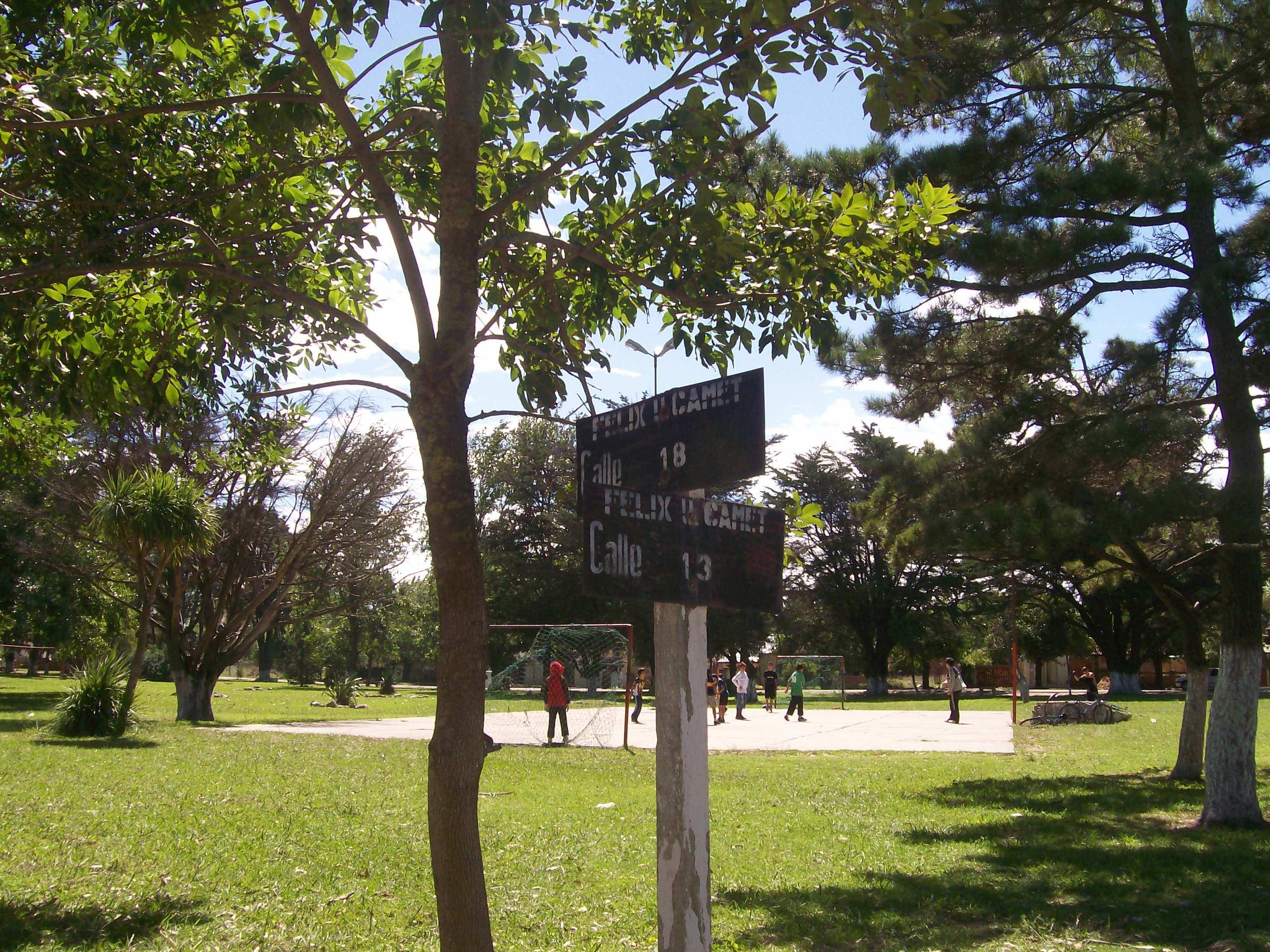 esquina